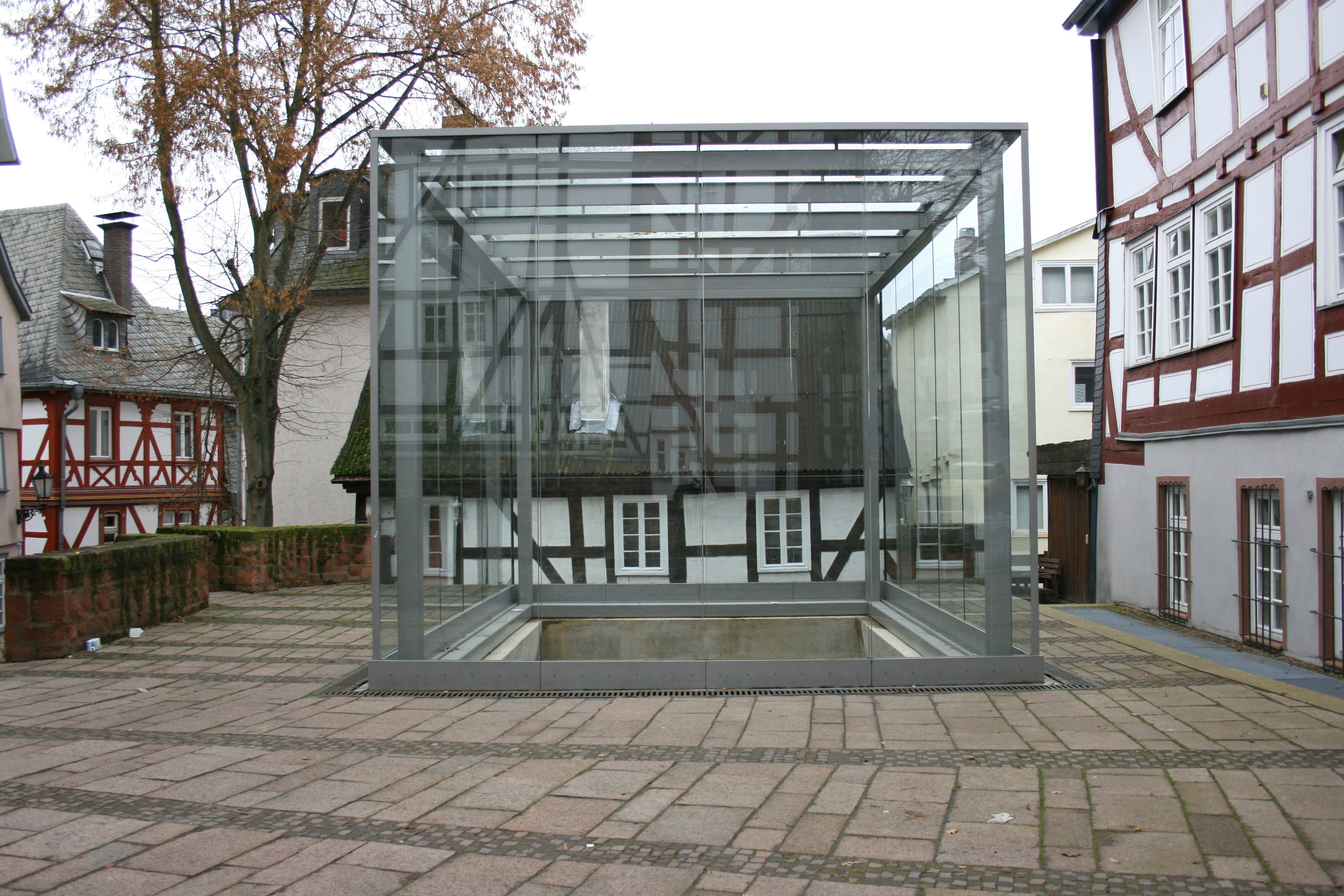 Schlosssteig in Marburg